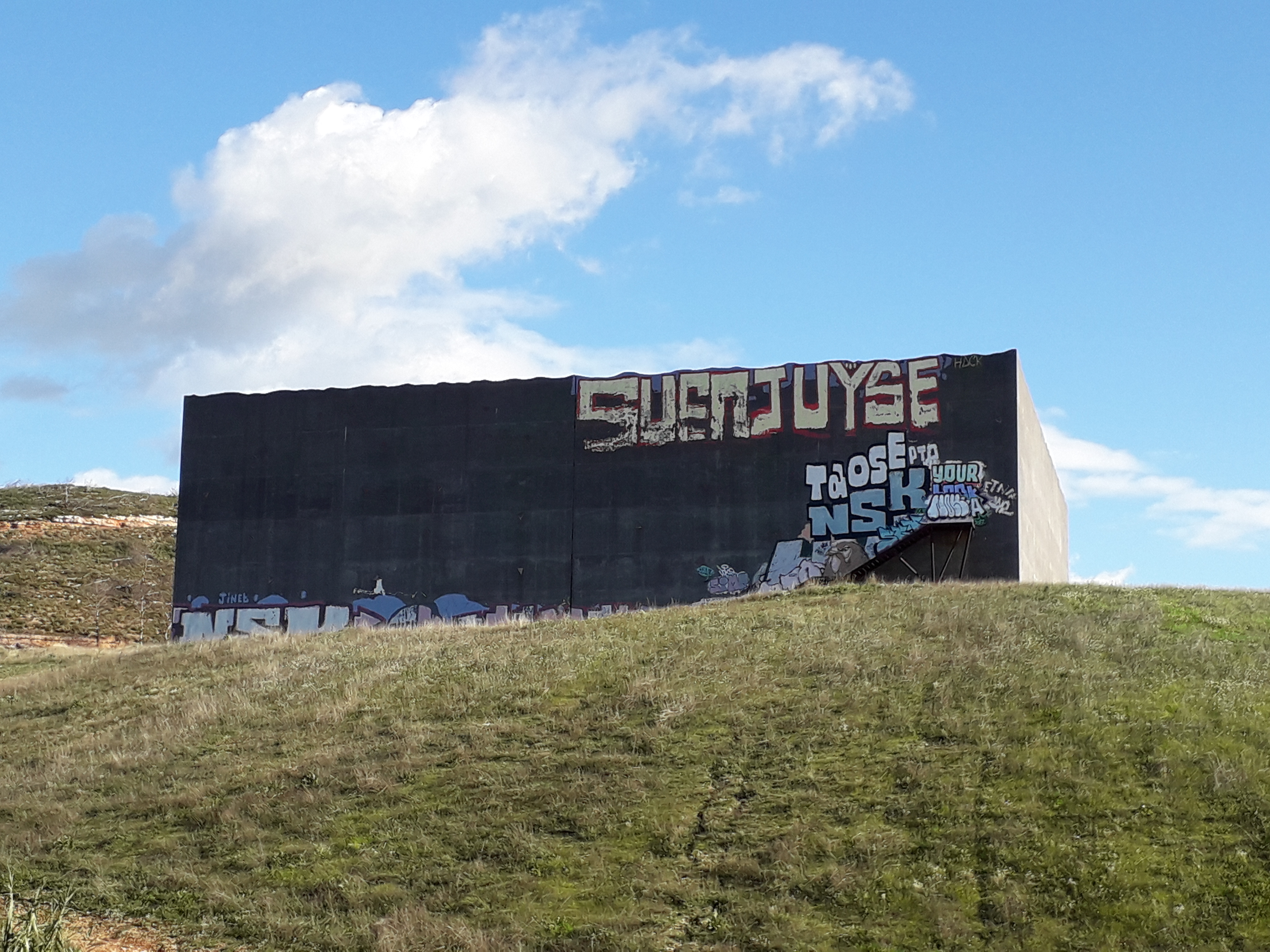 Stadium de Vitrolles Façade nord